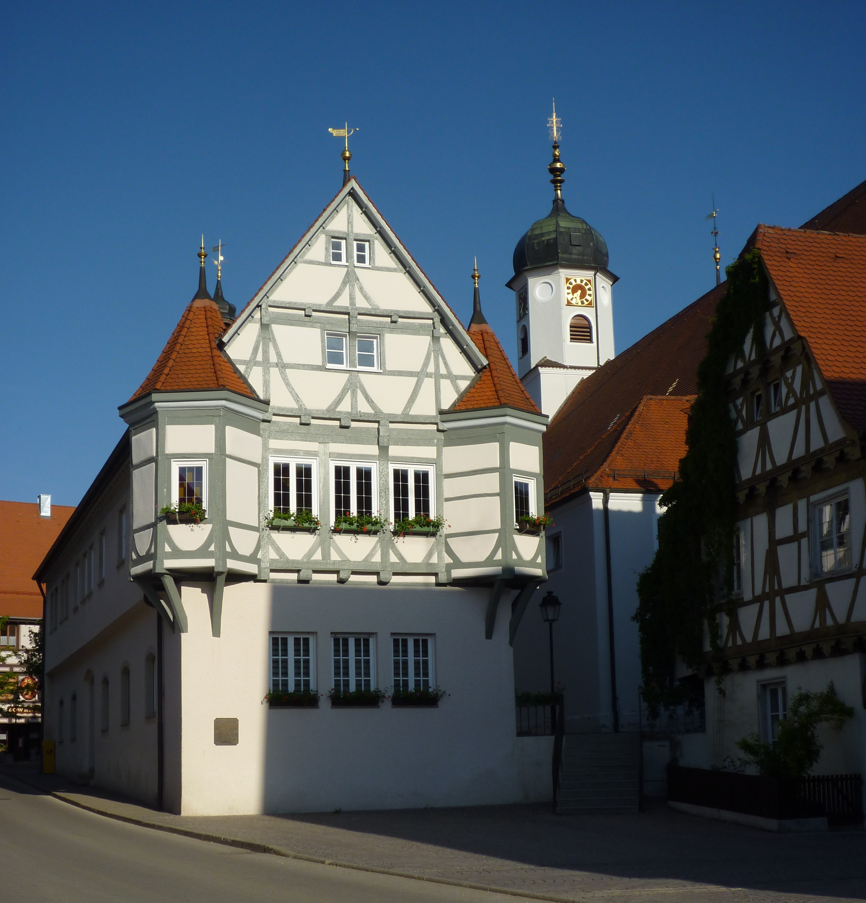 Hayingen - Rathaus 16. Jh.und Kirchturm St. Vitus